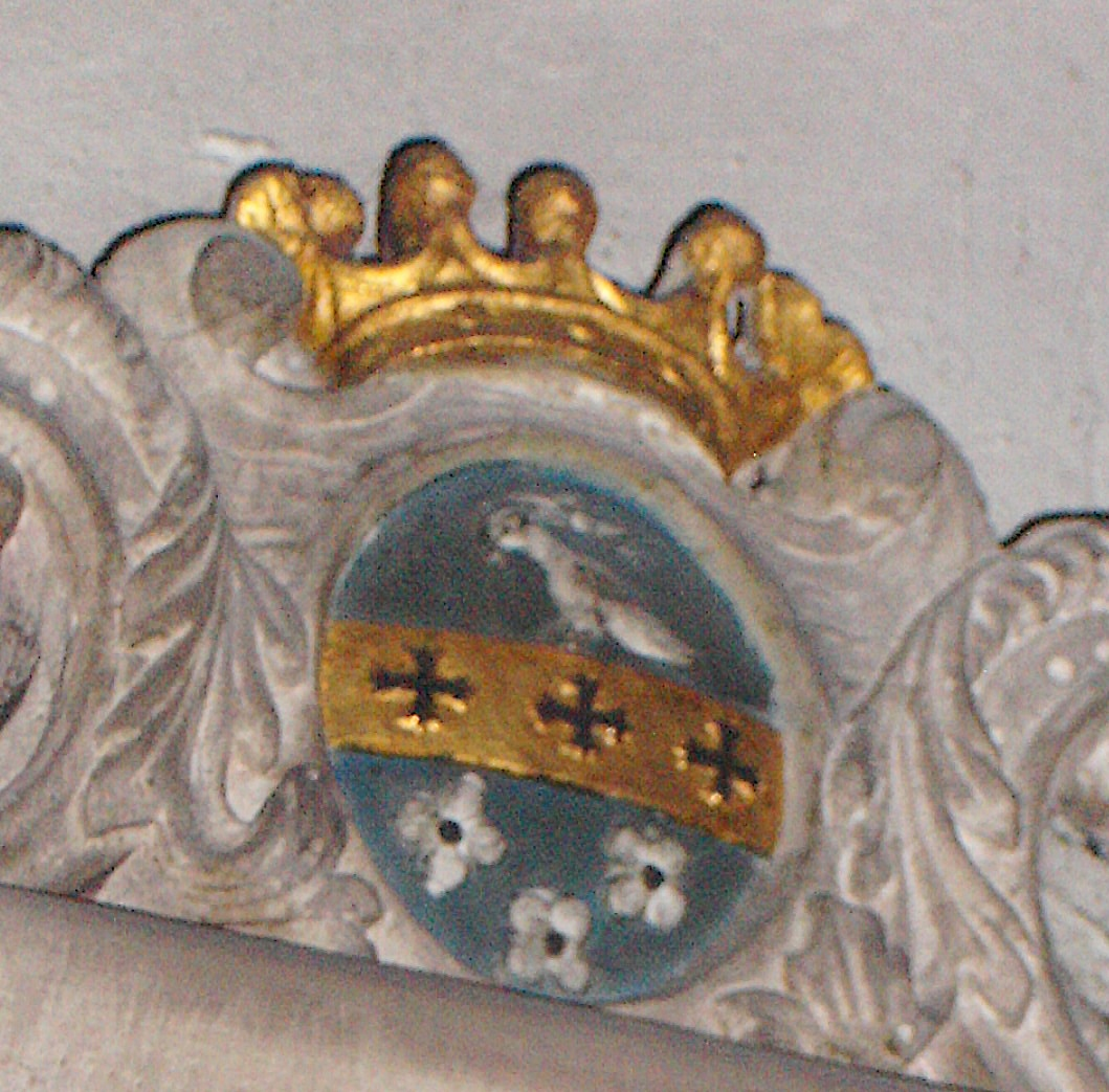 Johann Anton Wallreuther, Weihbischof von Worms (+1734), Wappen vom Epitaph, Worms, Liebfrauen